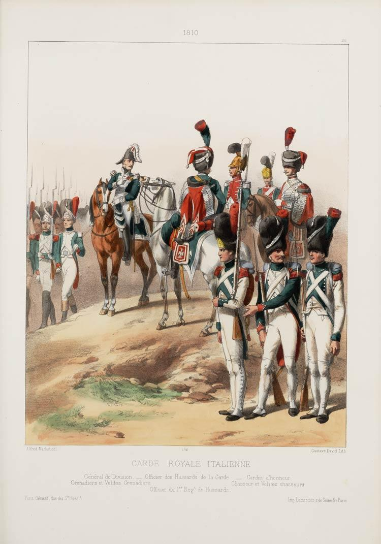 1810 Garde Royale Italienne: Général de Division; Officier des Hussards de la Garde; Officier du 1er Reg.t de Hussards; Gardes d'honneur; Grenadiers et Velites Grenadiers; Chasseur et Velites chasseurstratto da: "Costumes militaires français depuis 1439 jusqu'en 1789 / A. de Marbot" Gambart, Junin & Co